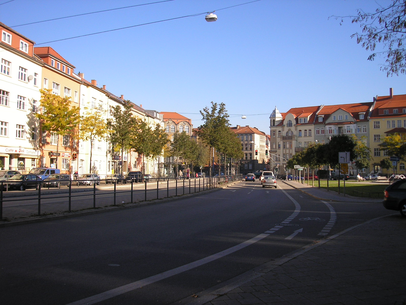 Der Leipziger Platz in Erfurt.